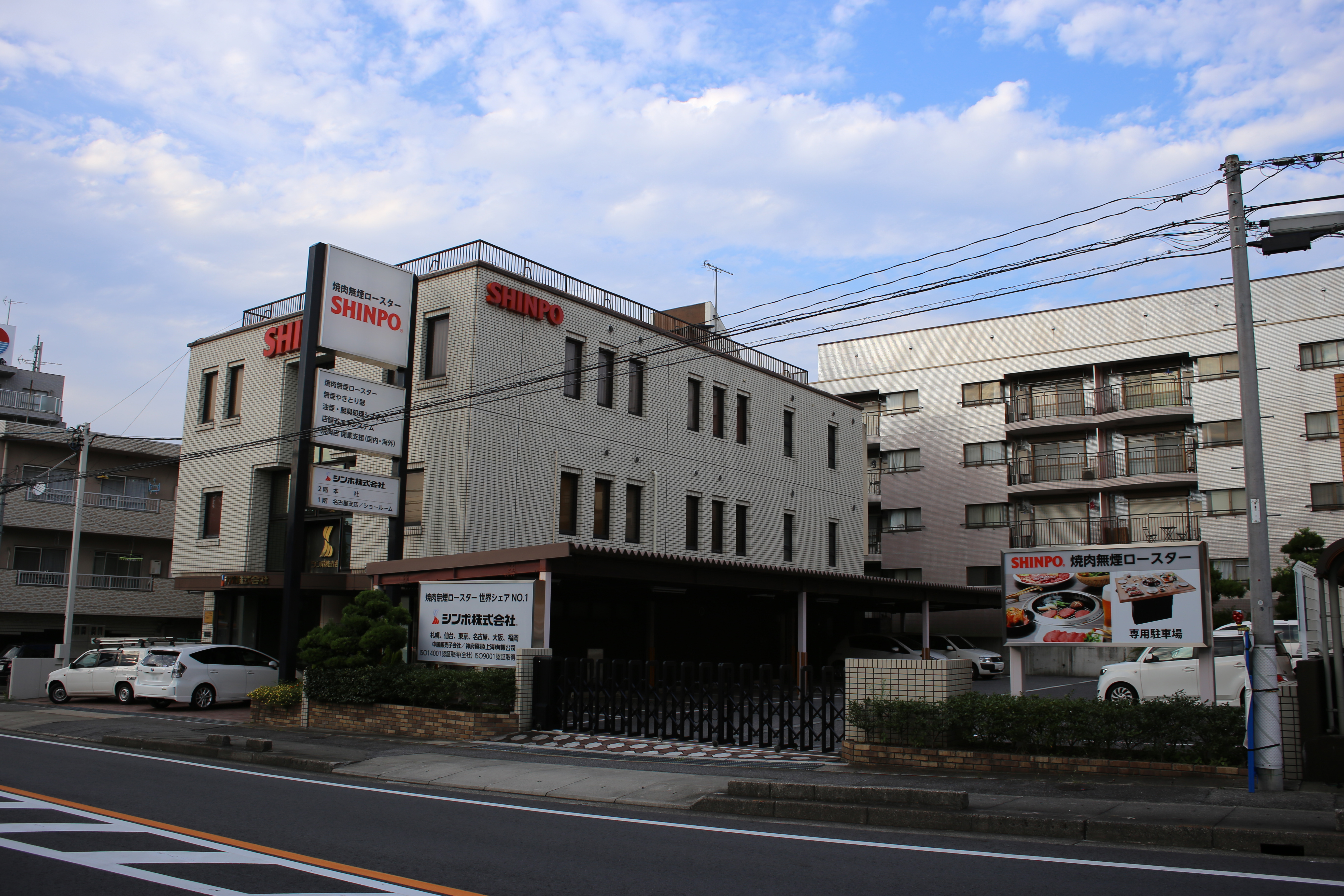 名古屋市名東区若葉台のシンポ本社を西側公道南側より撮影。ただし、ナンバープレートにつき、画像処理済み。